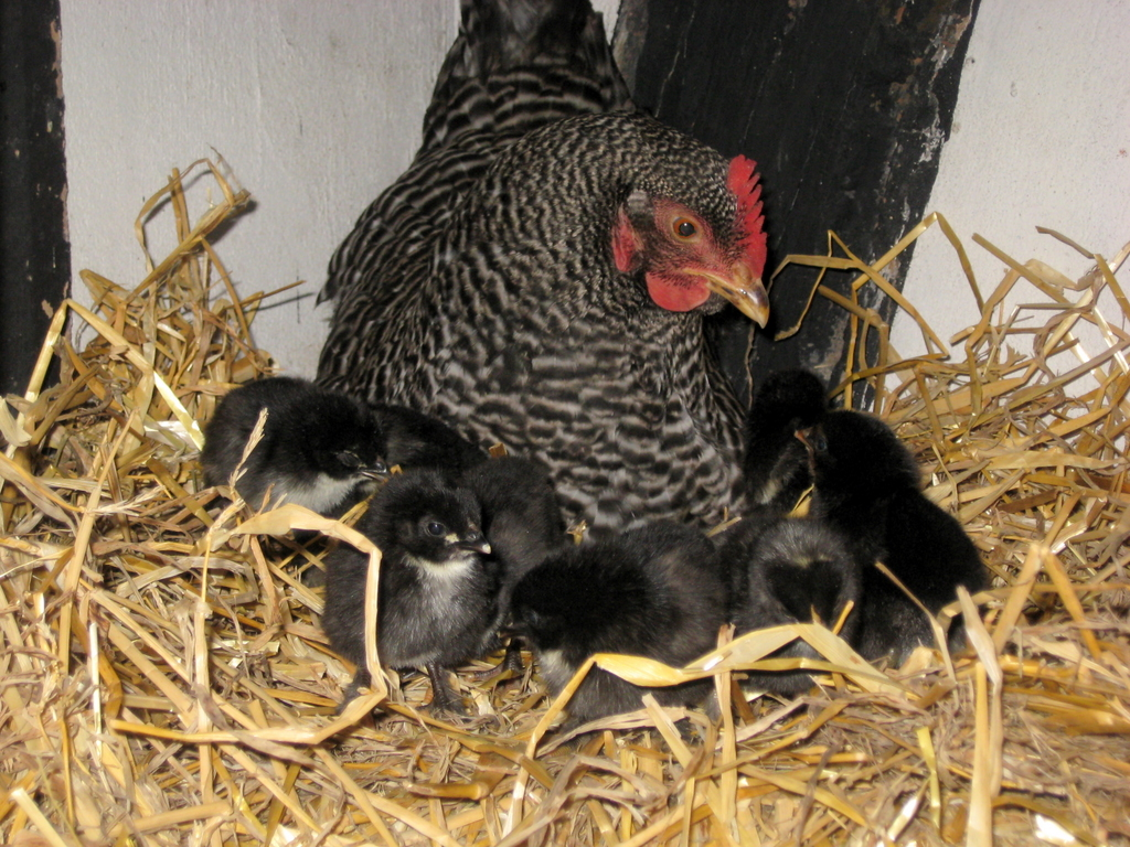 Amrockhenne mit Kücken